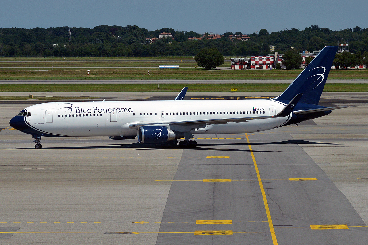 Blue Panorama, EI-CMD, Boeing 767-324 ER